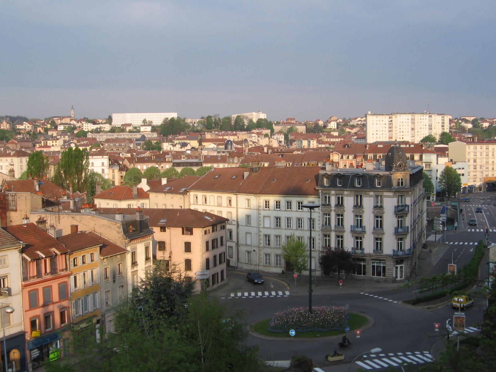 Epinal, may 2006